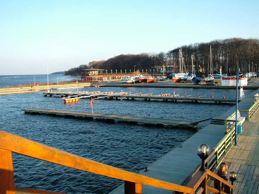 Puck - basen jachtowy.